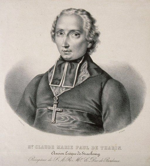 Mgr Claude Marie Paul de Tharin, Ancien Evêque de Strasbourg né en 1787, Buste, 3/4 à g. Bibliothèque nationale et universitaire de Strasbourg